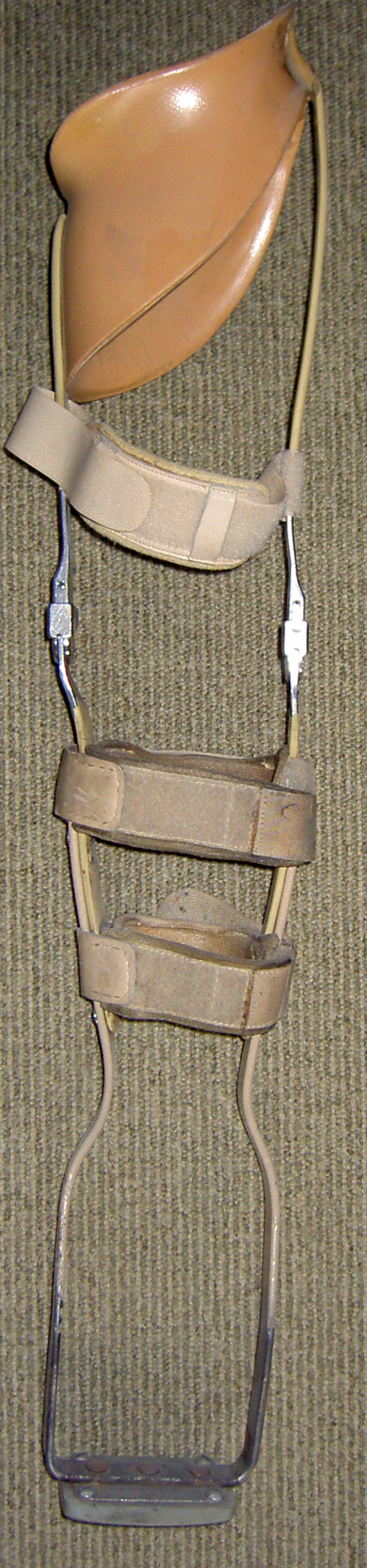 Eine Schiene, die zur Behandlung von Morbus-Perthes als Entlastung des Beines und somit zur besseren Durchblutung des Hüftgelenks dienen soll.